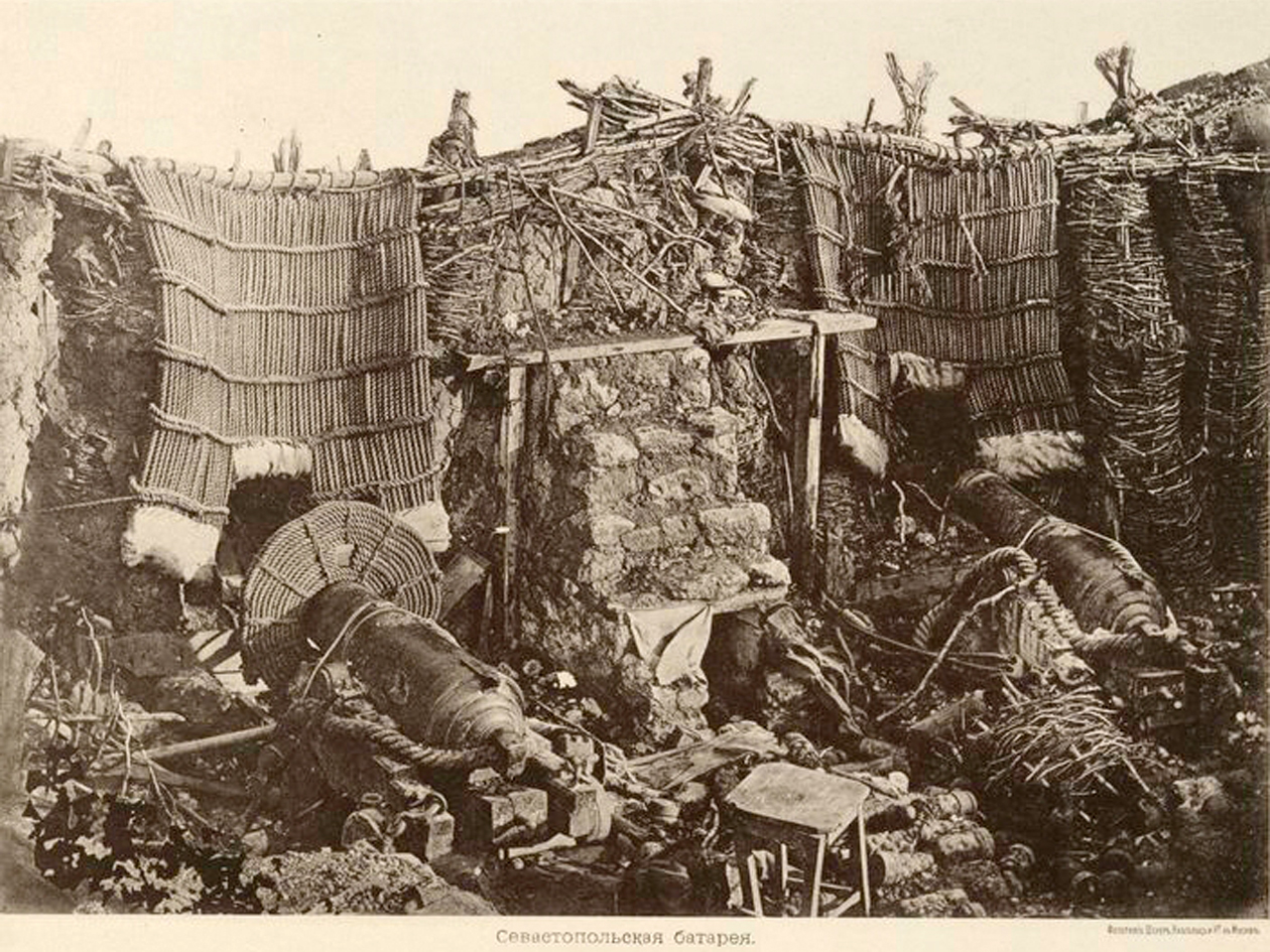 Севастопольская батарея. Стр.16 из фотоальбома: "Севастополь в 1855-1856 г. 25 фотографических снимков с редкого фотографического альбома."